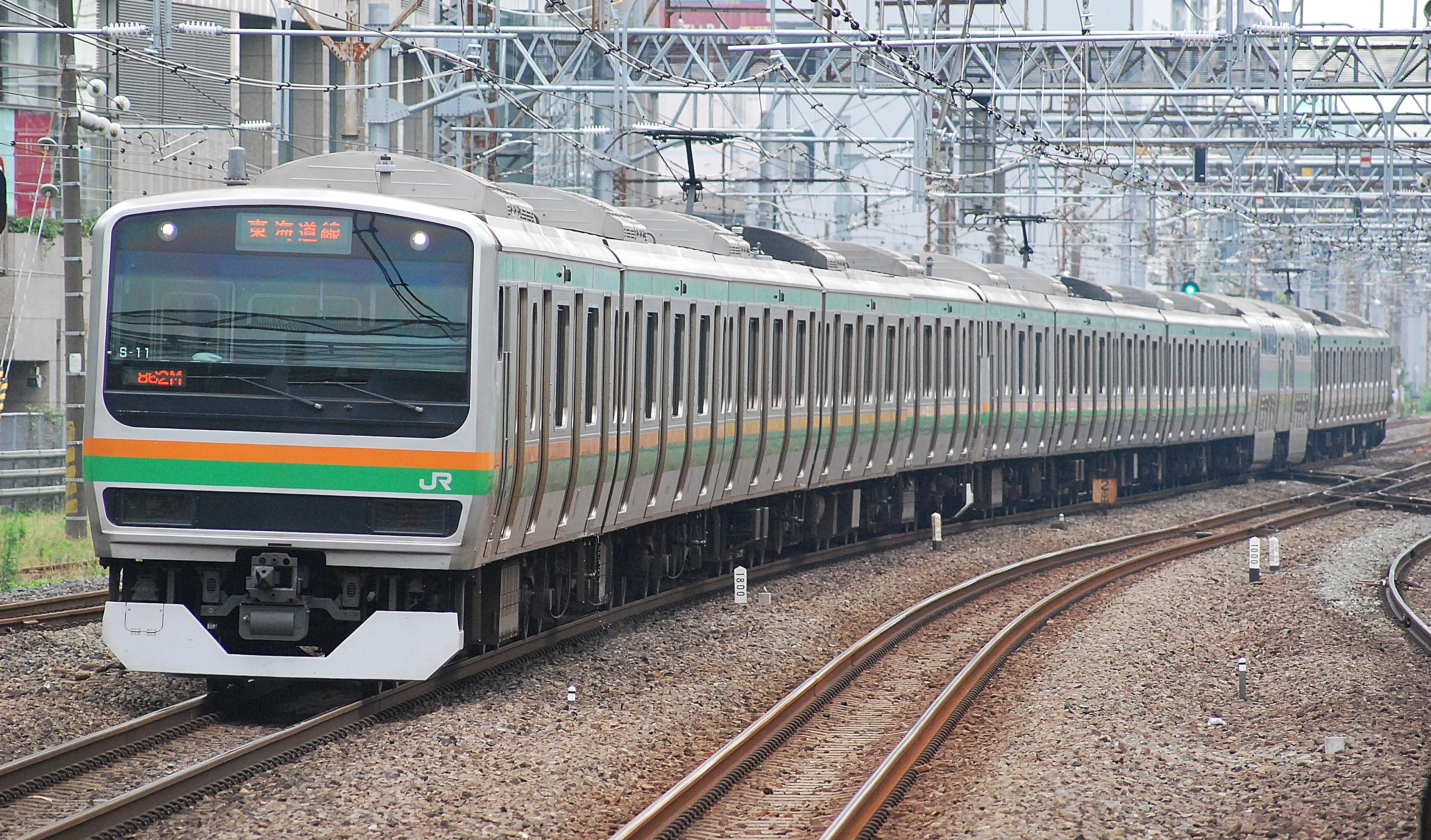 川崎駅に到着するE231系（ホームから撮影）